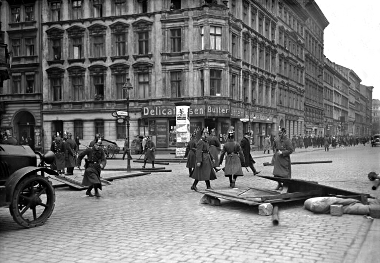 Die grossen Mai-Unruhen in Berlin! Baumaterialien, welche von den Kommunisten zum Bau einer Barrikade herangeschleppt wurden, werden von der Polizei beseitigt. Im Hintergrund die auseinandergetriebenen Demonstranten.